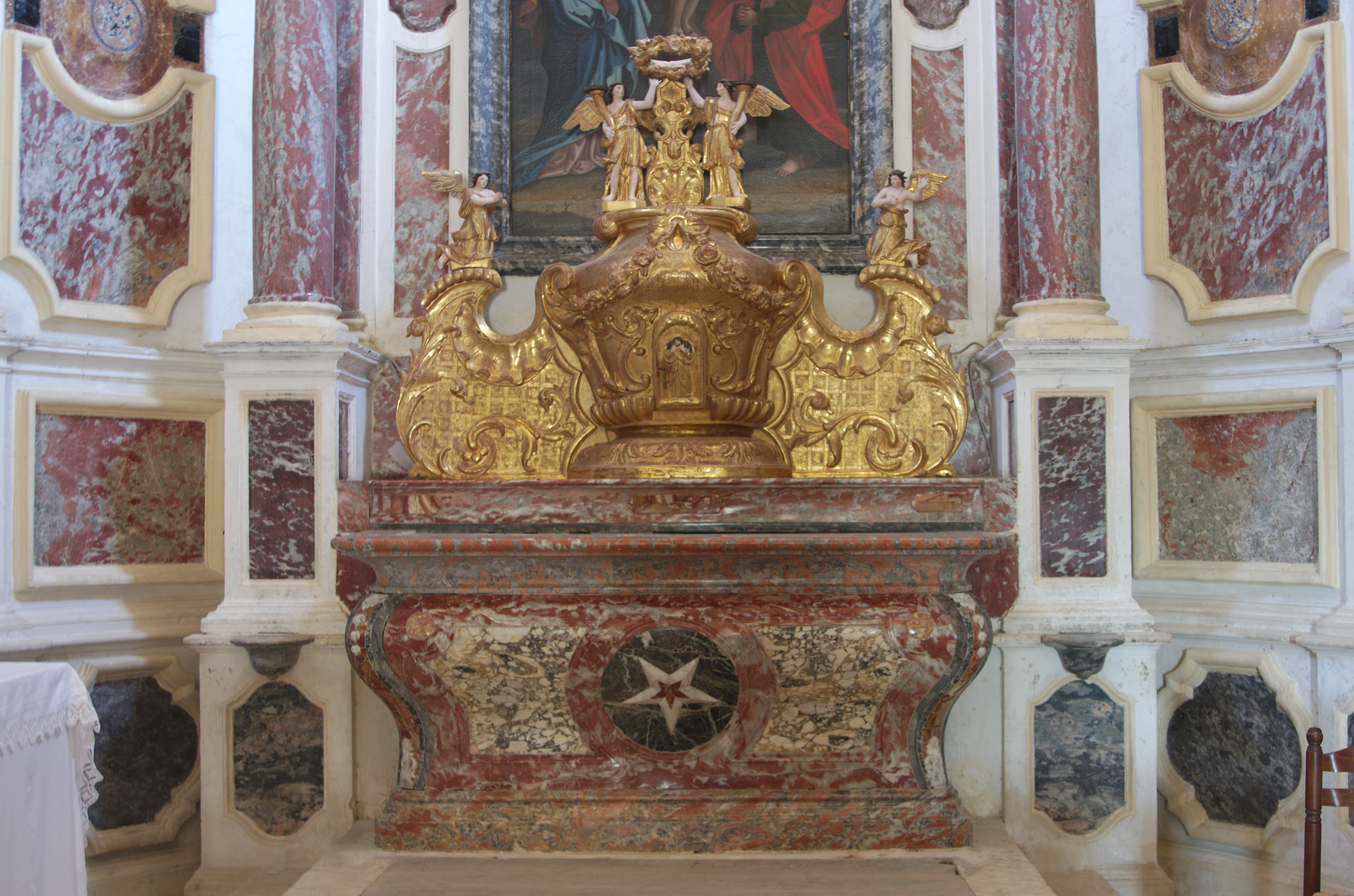 01082013 - Église de la Chaire-de-Saint-Pierre de Cambayrac